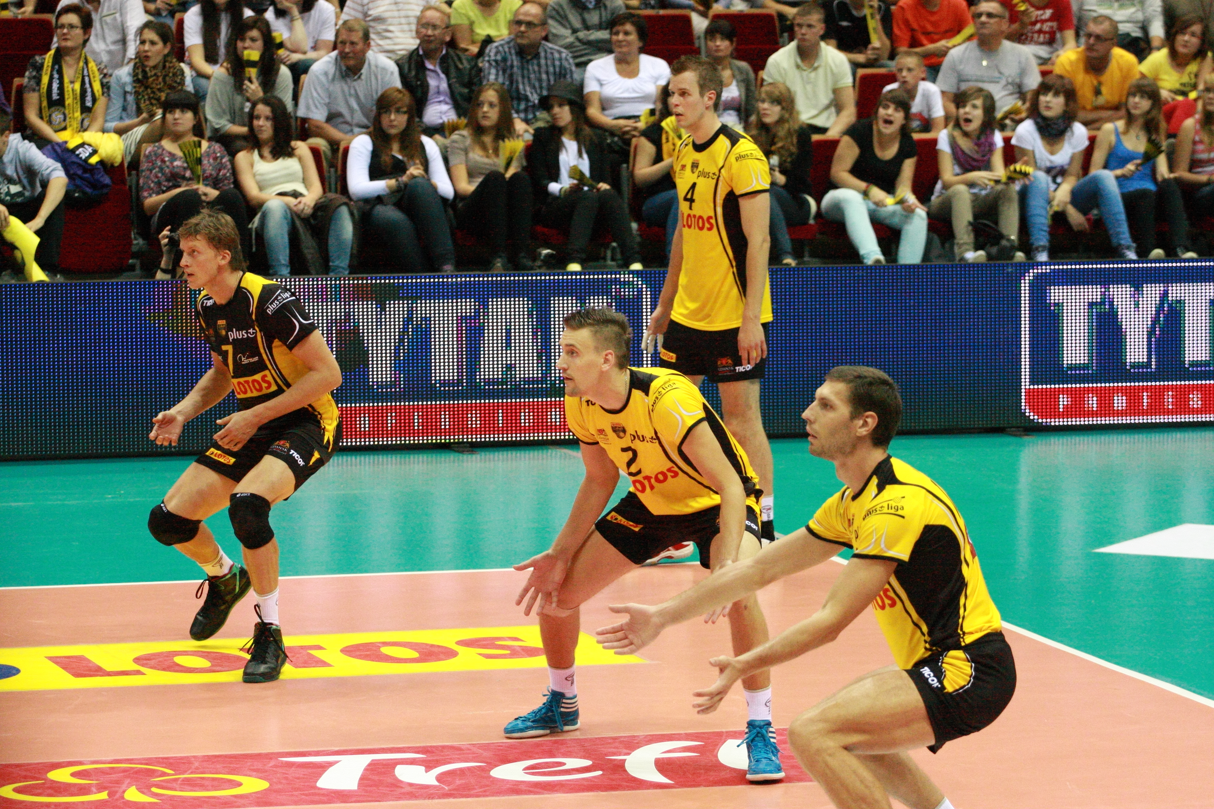 Skra Bełchatów vs Lotos Gdańsk, od lewej: Wojciech Serafin (7), Matti Hietanen (2), Mikko Oivanen (4).